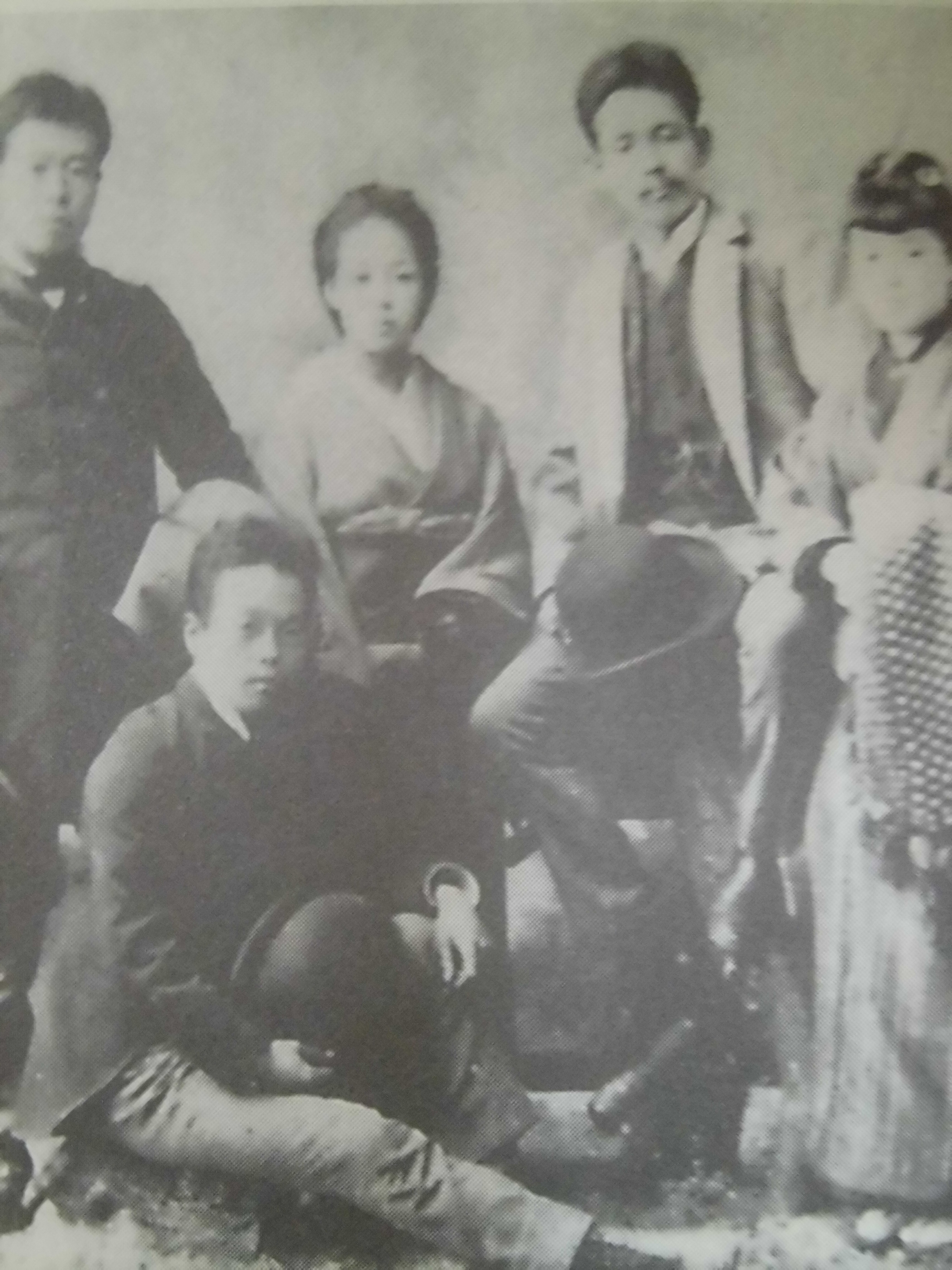 平野家の人々（Hirano Family）